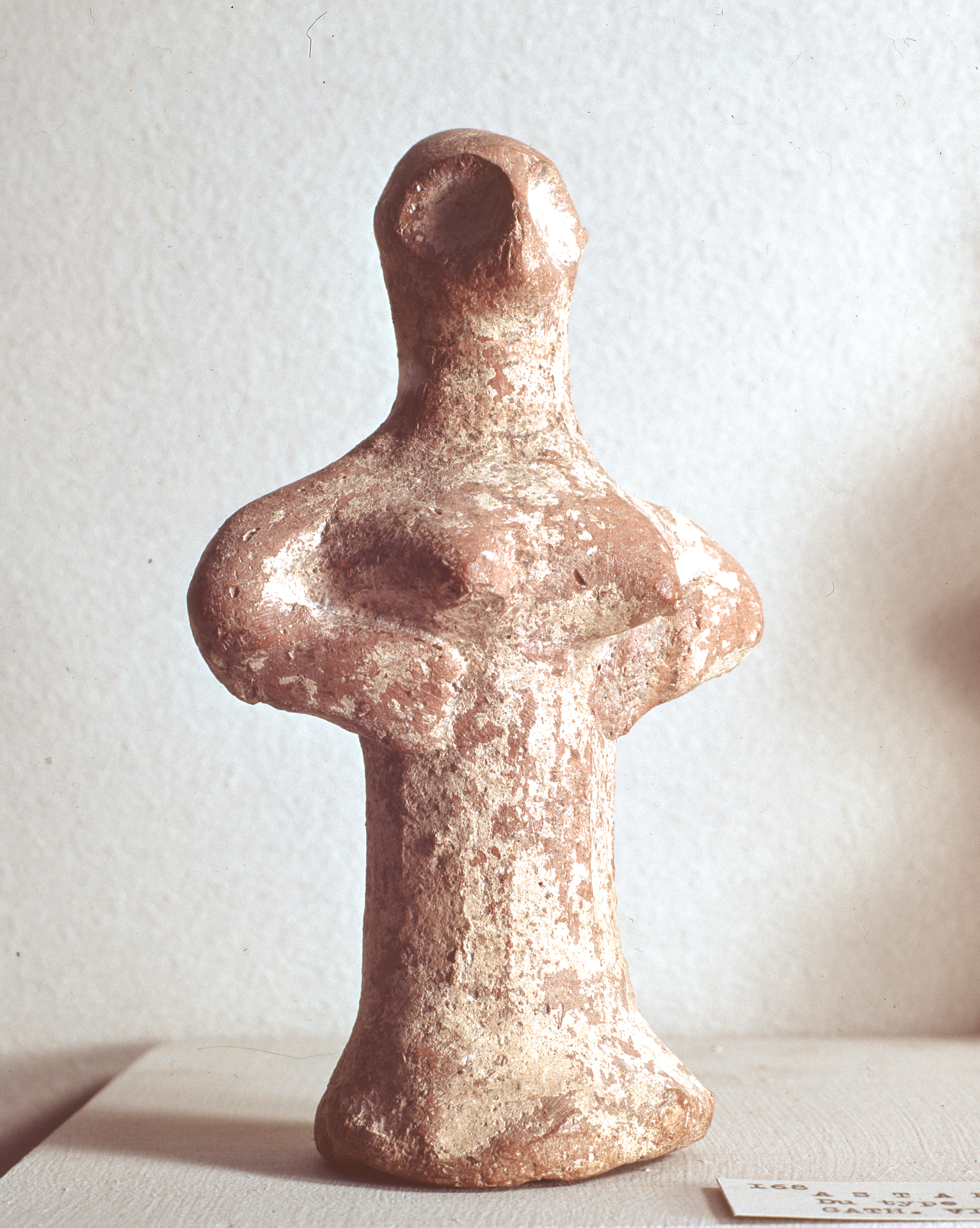 Figurines piliers judéennes, VIIIe – VIe siècle av. J.-C. (Musée d'Israël, Jérusalem)